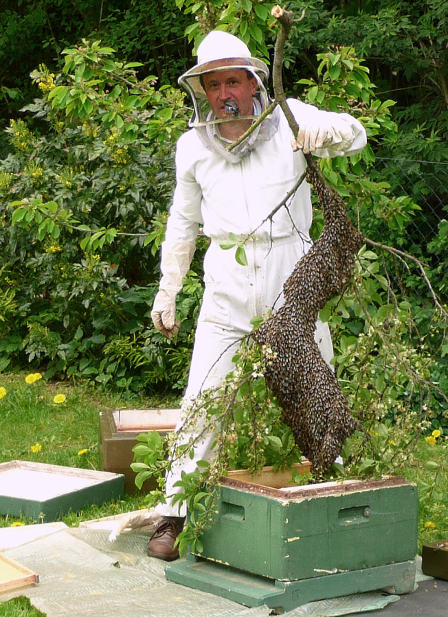 Imker mit Schwarm beim Einschlagen in Magazinbeute